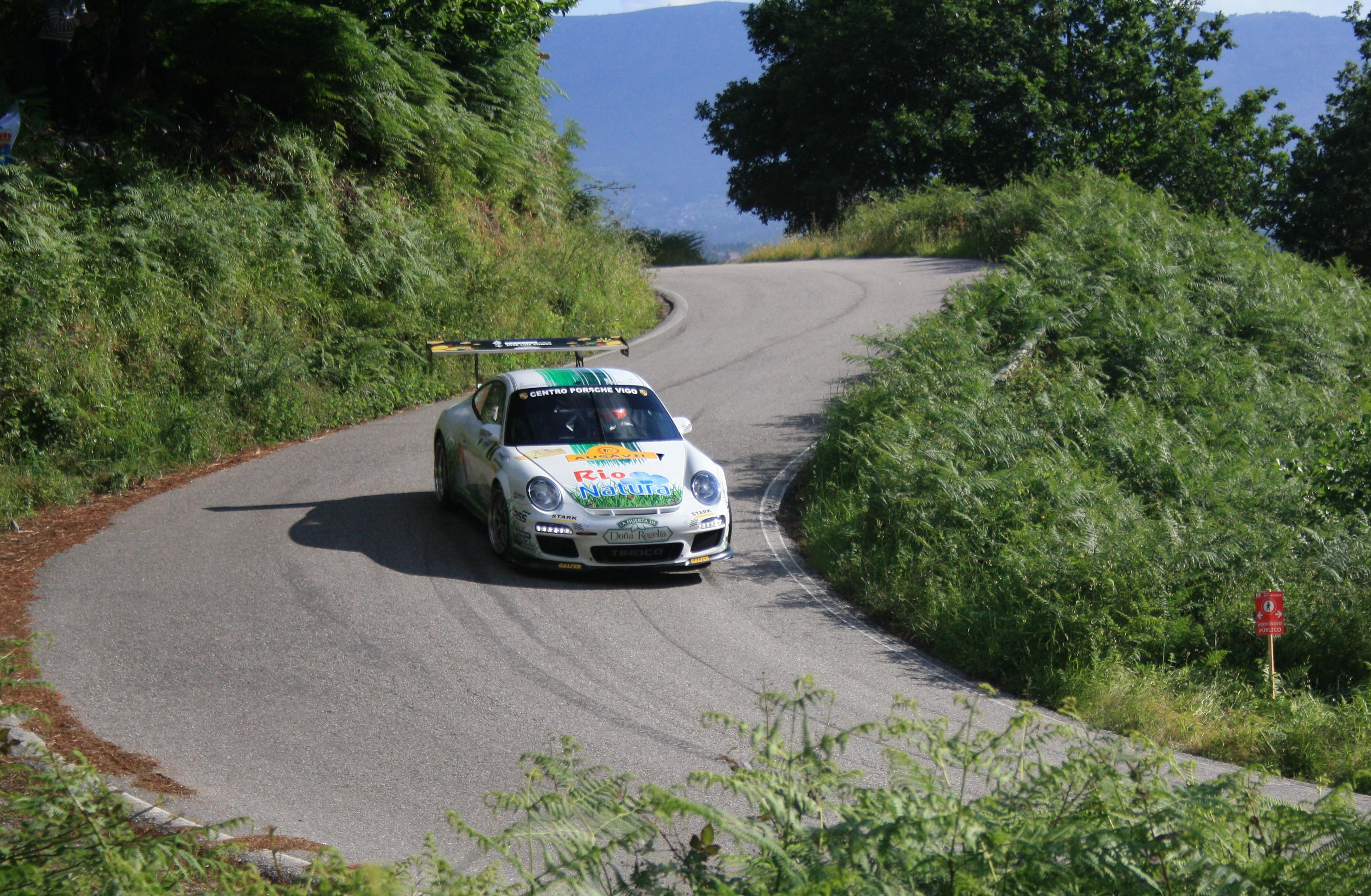 Sergio Vallejo en el Rally Rías Baixas en el año 2014, en la primera pasada del primer tramo de la edición, Alba-Nigrá, entre las parroquias de Camos y Chandebrito.